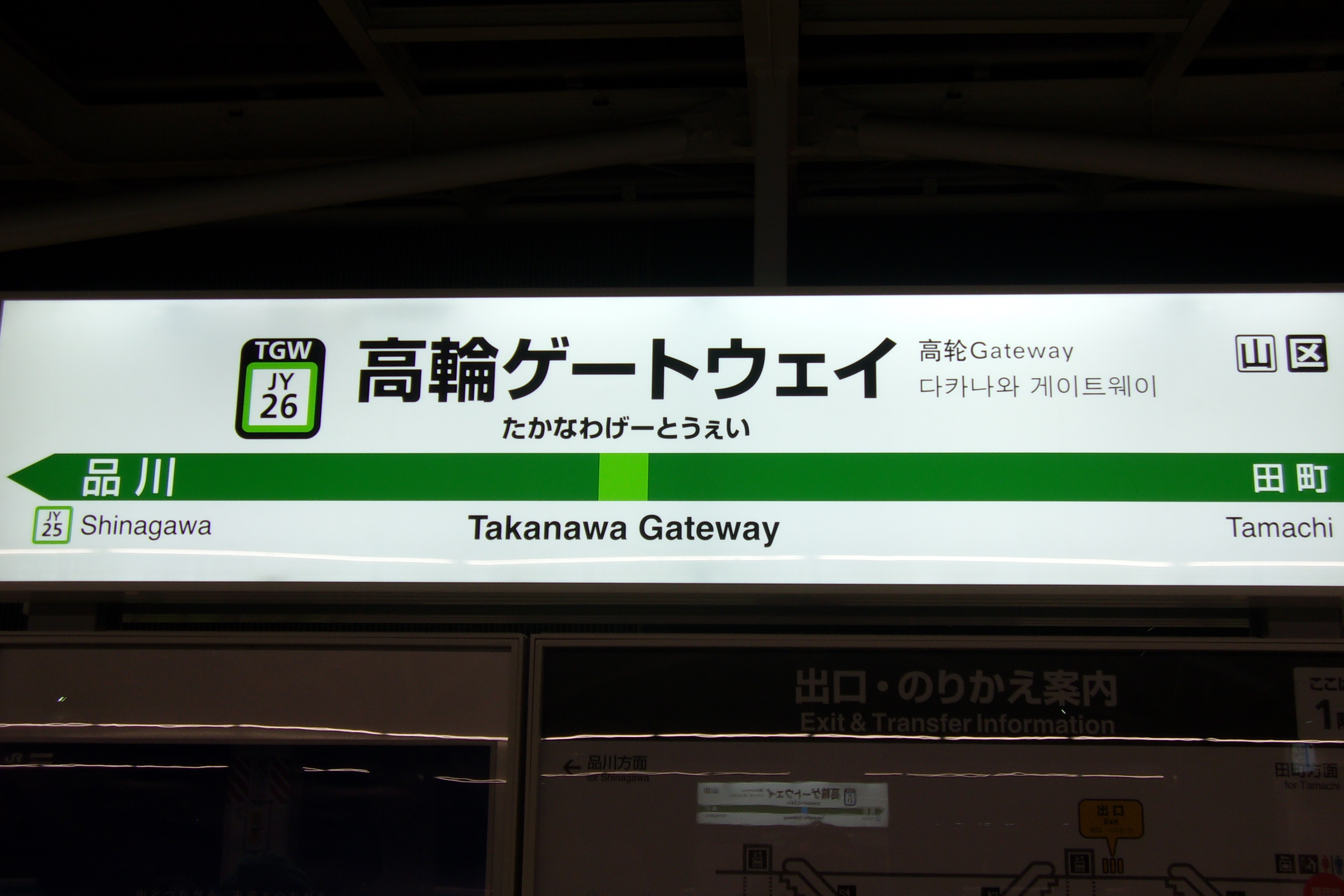 高輪ゲートウェイ駅の駅名標（山手線内回り）